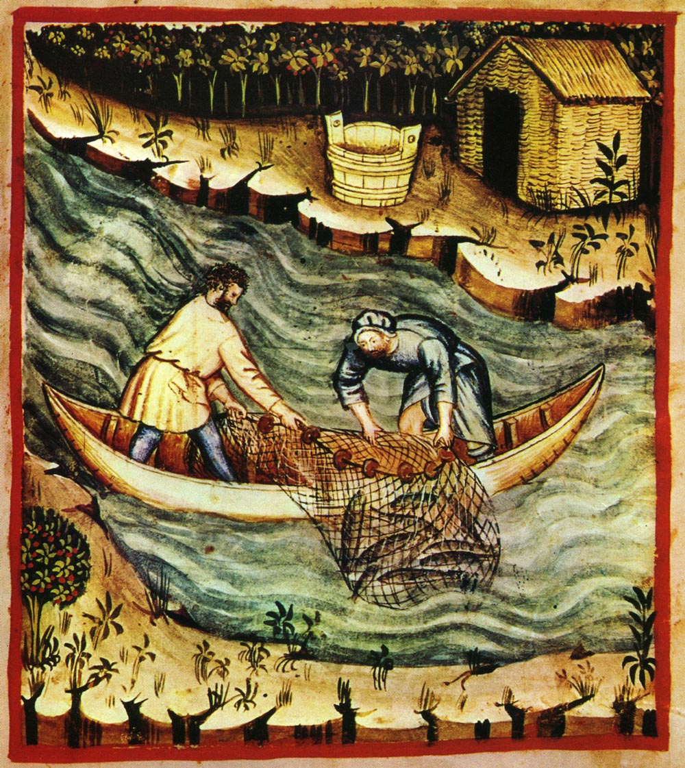 Tacuina sanitatis (XIV century) 6-pesca,Taccuino Sanitatis, Casanatense 4182, tav. 157.